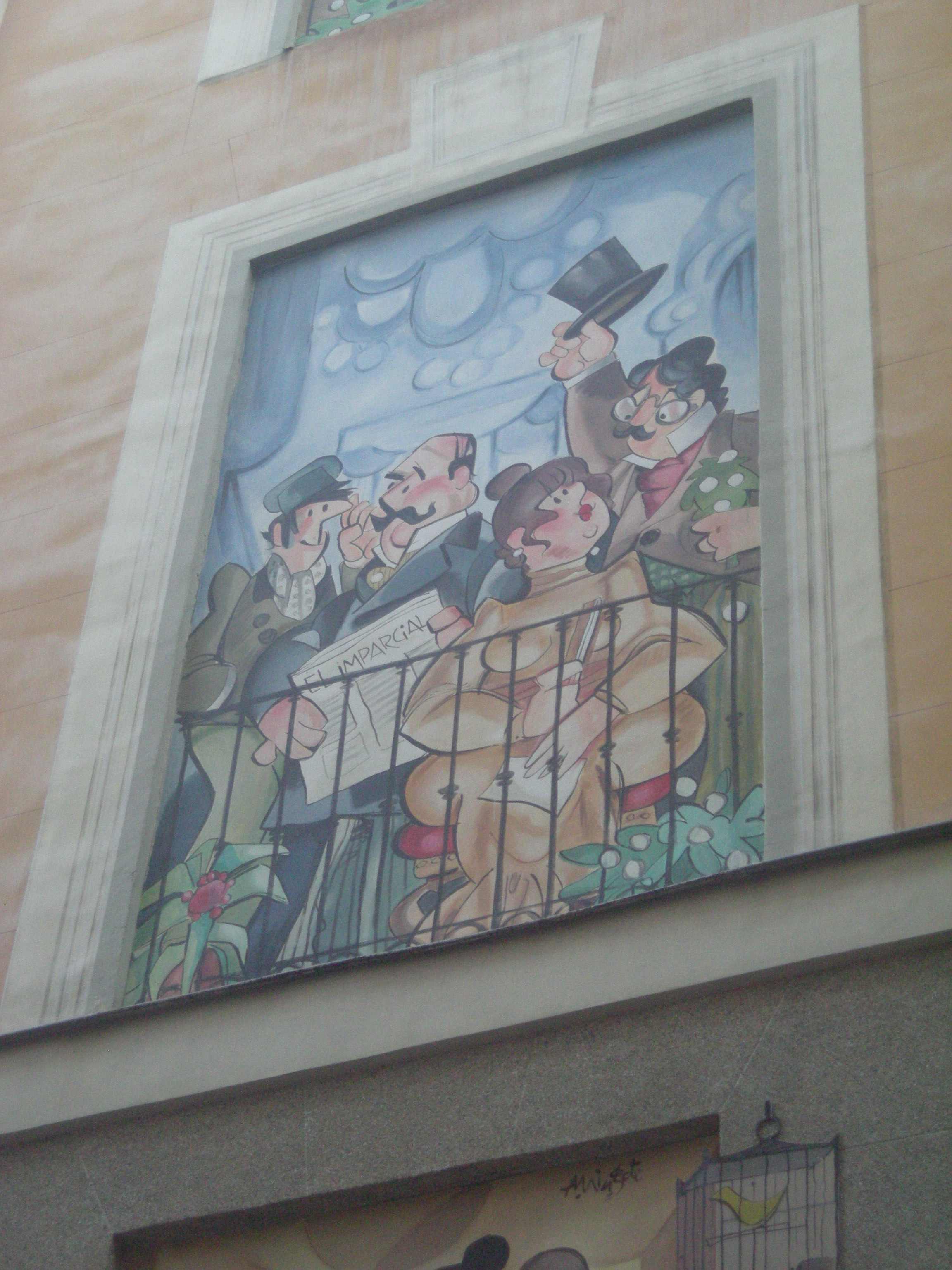 Mural del viñetista Antonio Mingote;C/ de la Sal, Madrid, España.